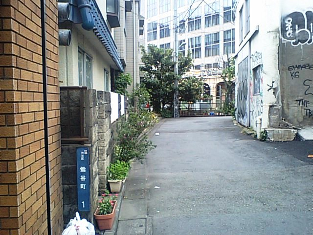 東京都渋谷区鶯谷町1番地付近